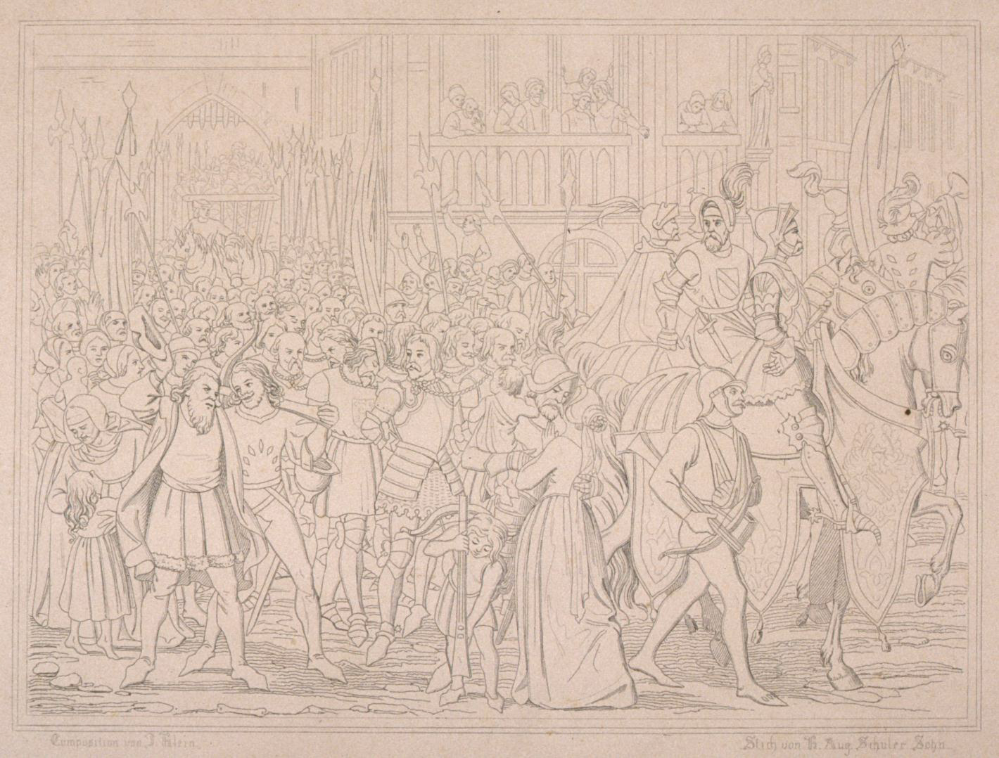 Retour triomphant des troupes de Strasbourg, après la bataille de Hausbergen. Illustration tirée de In Zwölf Stahlstiche zum Elsaessischen Sagenbuch de A. Stöber, Strasbourg, G.L. Schuler, 1842